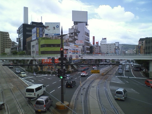 長崎駅高架広場付近の歩道橋から見た景観。